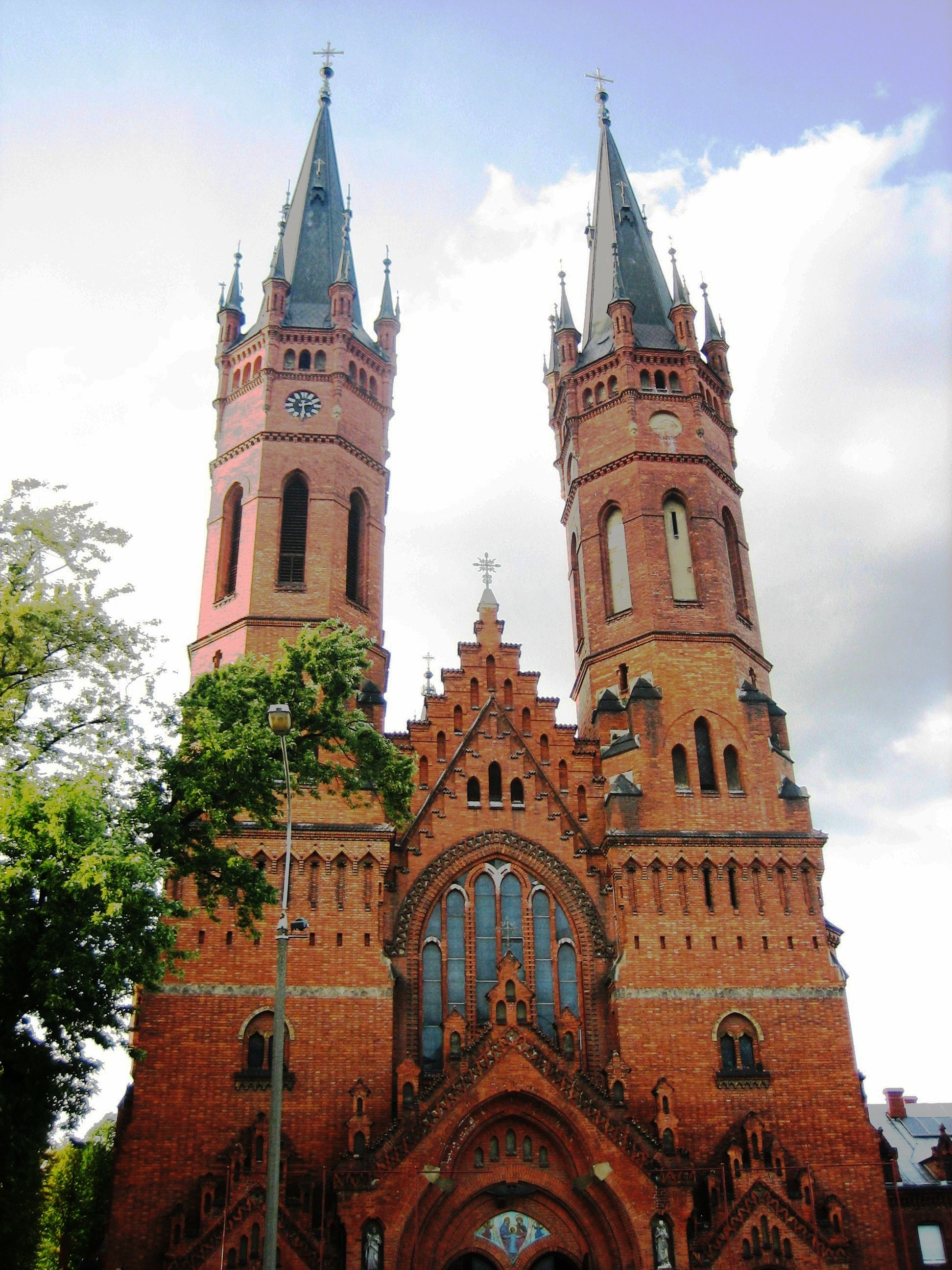 Kościół par. p.w. św. Rodziny (wraz z plebanią) w Tarnowie, ul. Krakowska 41